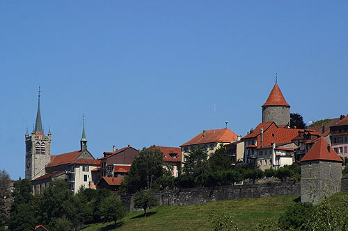 Romont (FR)